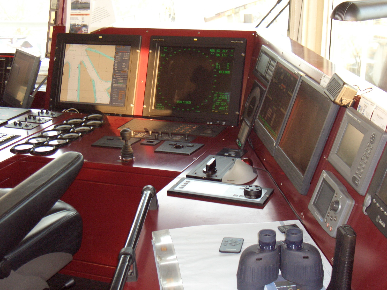 Steuerstand eines Schiffes mit XY-Steuer.